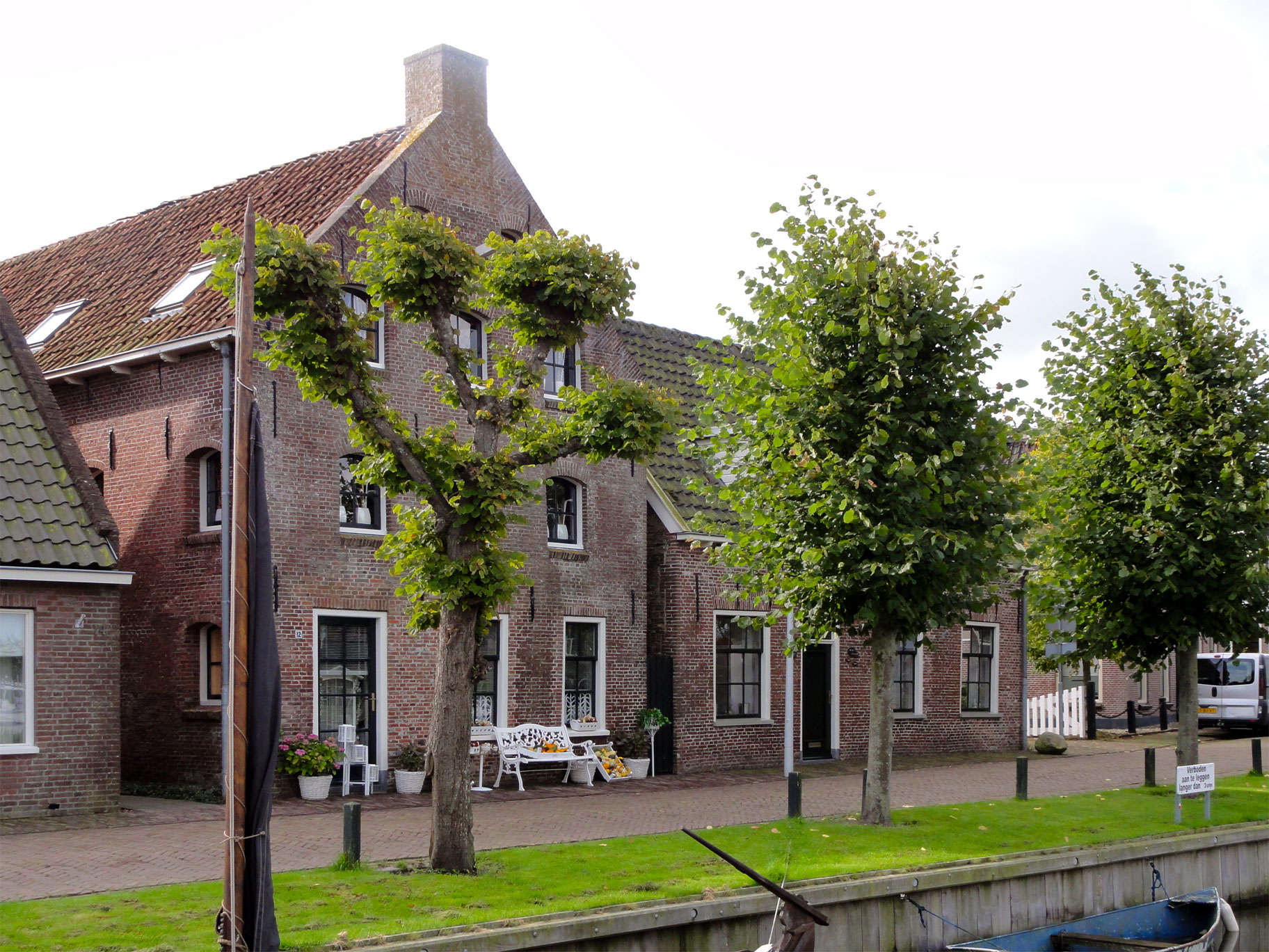 Elte Martens Beimastrjitte 12 en 10 Eastermar